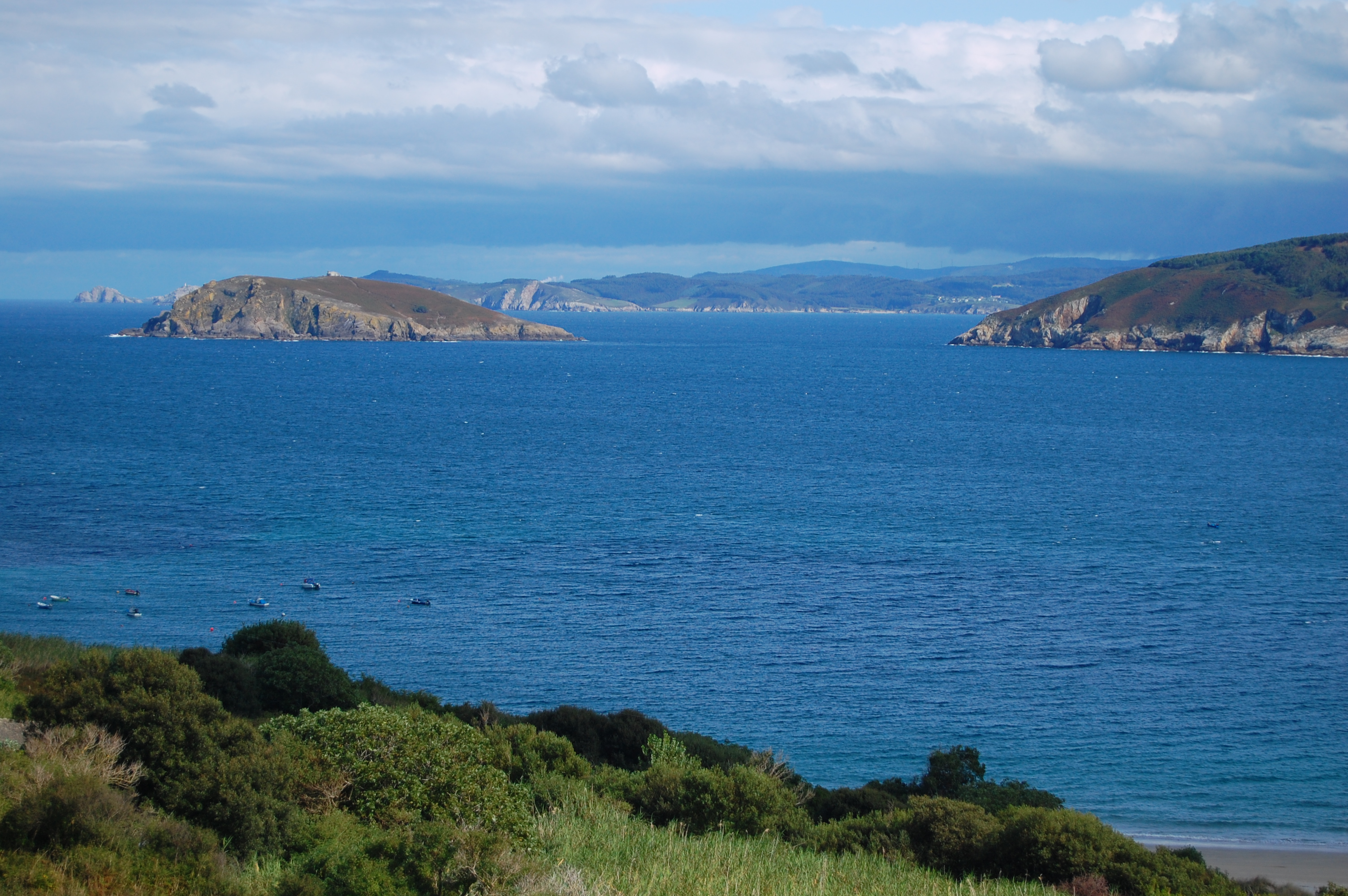 Ría do Barqueiro dende as proximidades da praia de Bares, visible no primeiro plano (LIC Estaca de Bares). A illa Coelleira e a punta do Embarcadoiro están en segundo plano. Ó fondo poden albiscarse o illote do Ansarón, a punta do Roncadoiro e a boca da ría de Viveiro. En último plano parece distinguirse parte da punta de Morás. A paisaxe tras a ría do Barqueiro pertence ó Lugar de Importancia Comunitaria Costa da Mariña Occidental. This is a photography of a Special Area of Conservation in Spain with the ID: ES1120017. Natura2000 entry, EEA entry This is a photography of a Special Area of Conservation in Spain with the ID: ES1110010. Natura2000 entry, EEA entry